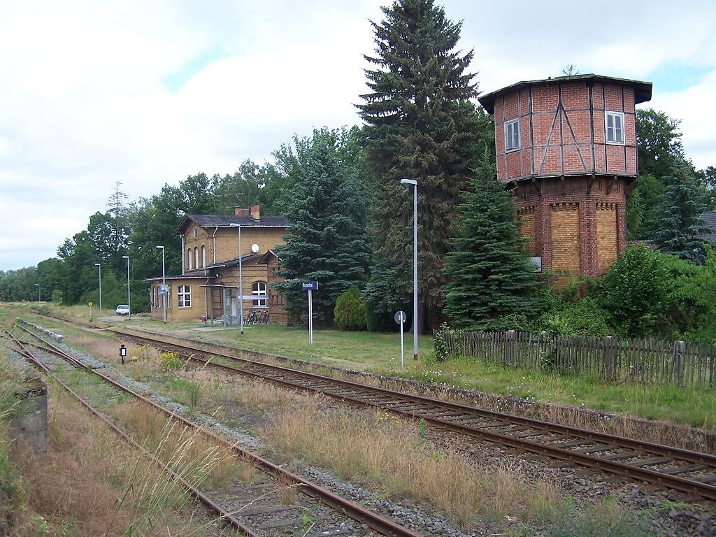 Bahnhof Blumenthal (Mark) an der KBS 209.73